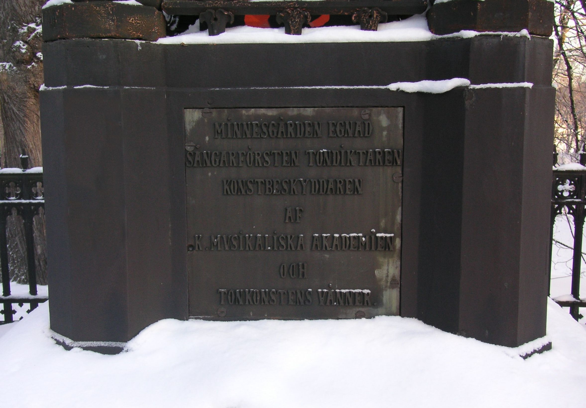 Prins Gustafs monument i Hagaparken, inskriptionen